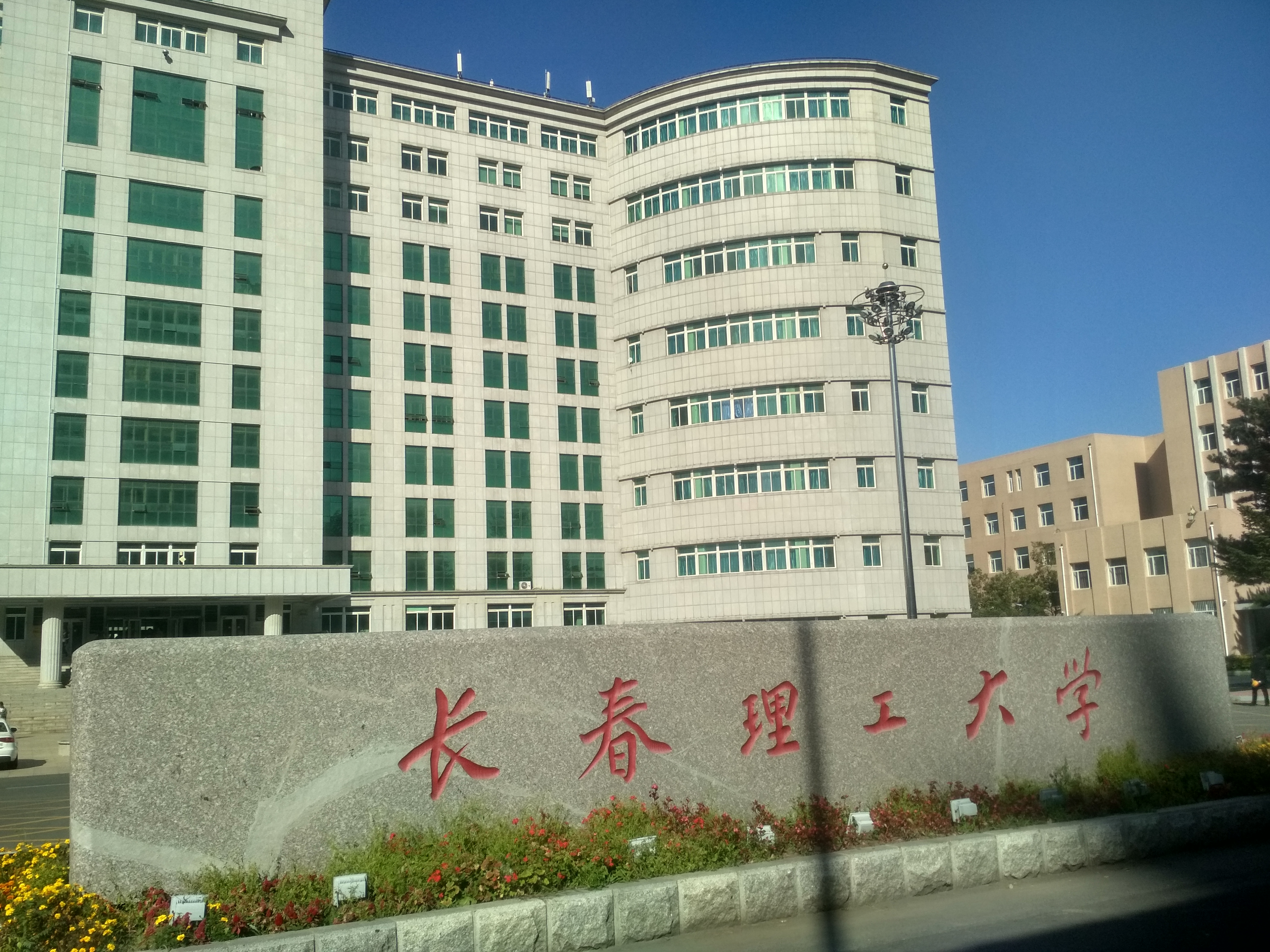 中文（中国大陆）: 长春理工大学